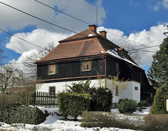 Fara, Rychnov 151, Rychnov (Verneřice).